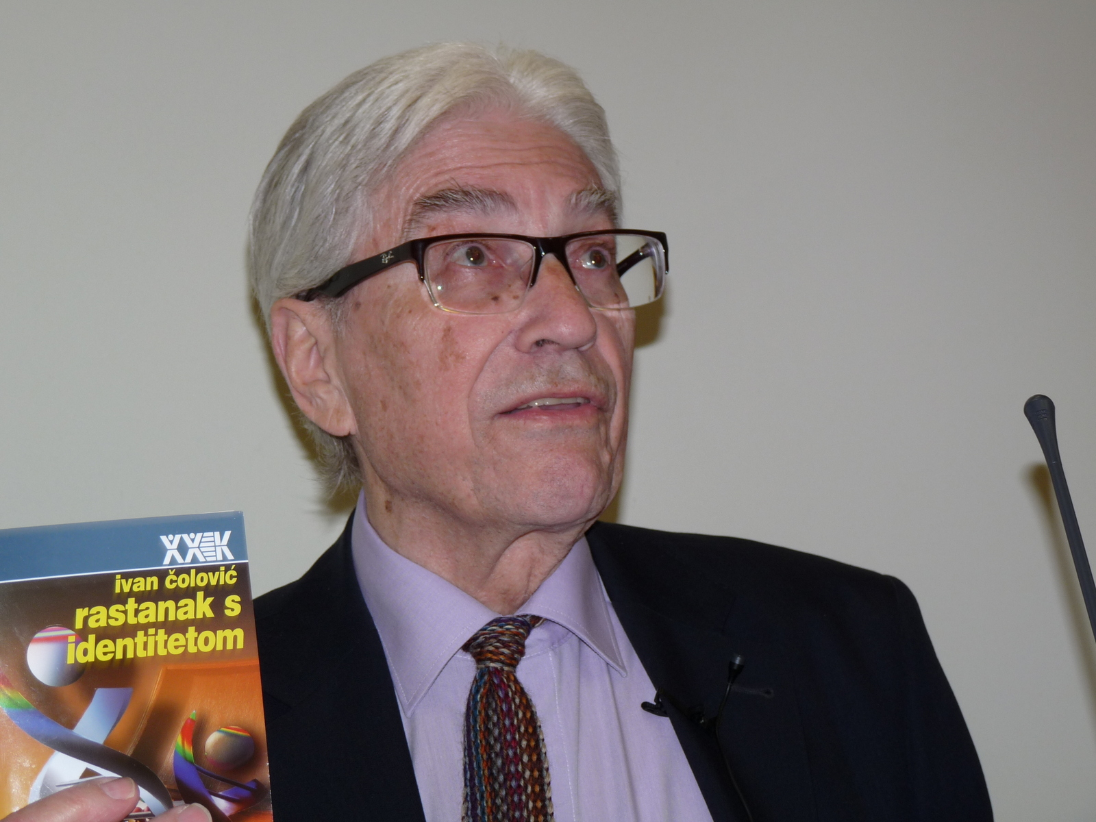 Professor Bugarski at his Ljubljana lecture on language identity